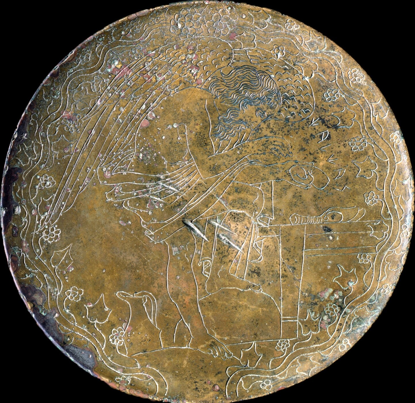 Miroir étrusque avec représentation de Calchas sous la forme d'un Haruspice. Vulci, Ve siècle av. JC. Musée du Vatican.